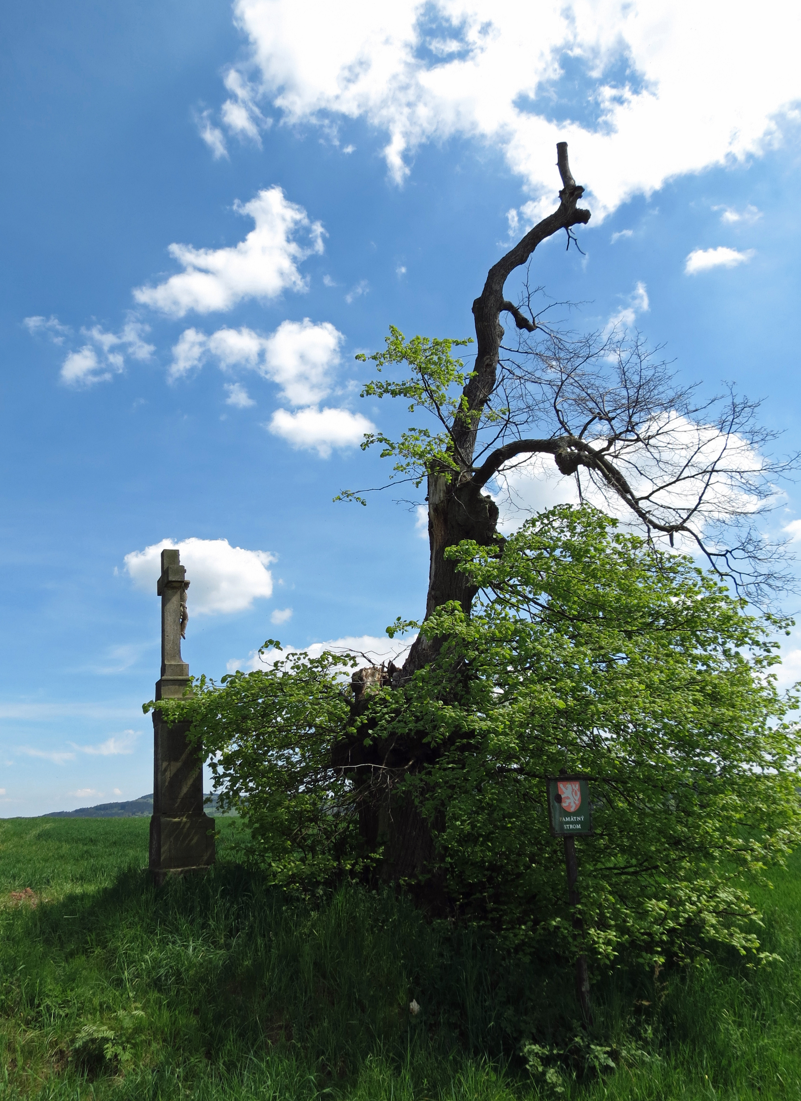 Lípa srdčitá Vidonice